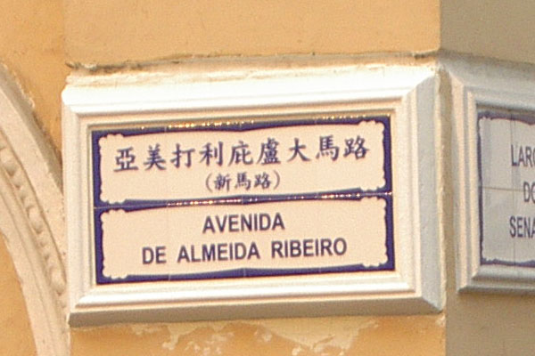 澳門亞美打利庇盧大馬路（新馬路）的街道名牌。澳門特色路牌的一個例子。小峰拍攝和上傳。